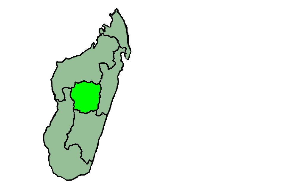 Antananarivo, province of Madagascar